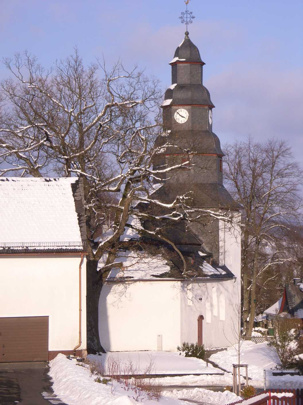 Barocke Fachwerkkirche in Oberhörlen, Gemeinde Steffenberg, Hessen